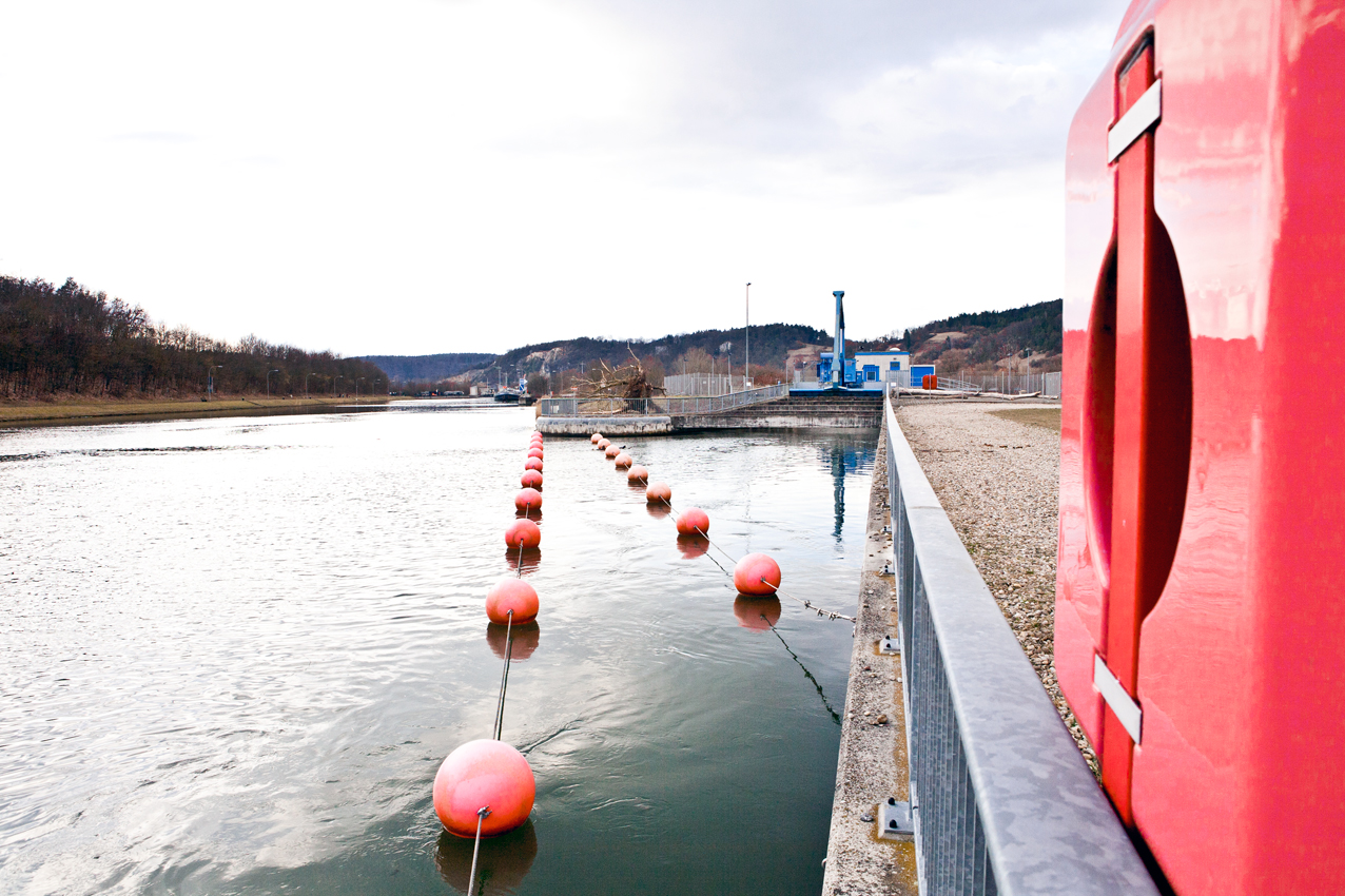 Blickrichtung Westnordwest (flussabwärts) Linke Bildseite: Zufahrt zur Schleuse Bad Abbach (Oberwasser) Bildmitte: Zufluss zum Bahnstromkraftwerk (Oberwasser). Hydraulische Maschine zur Reinigung des Rechens (blau)